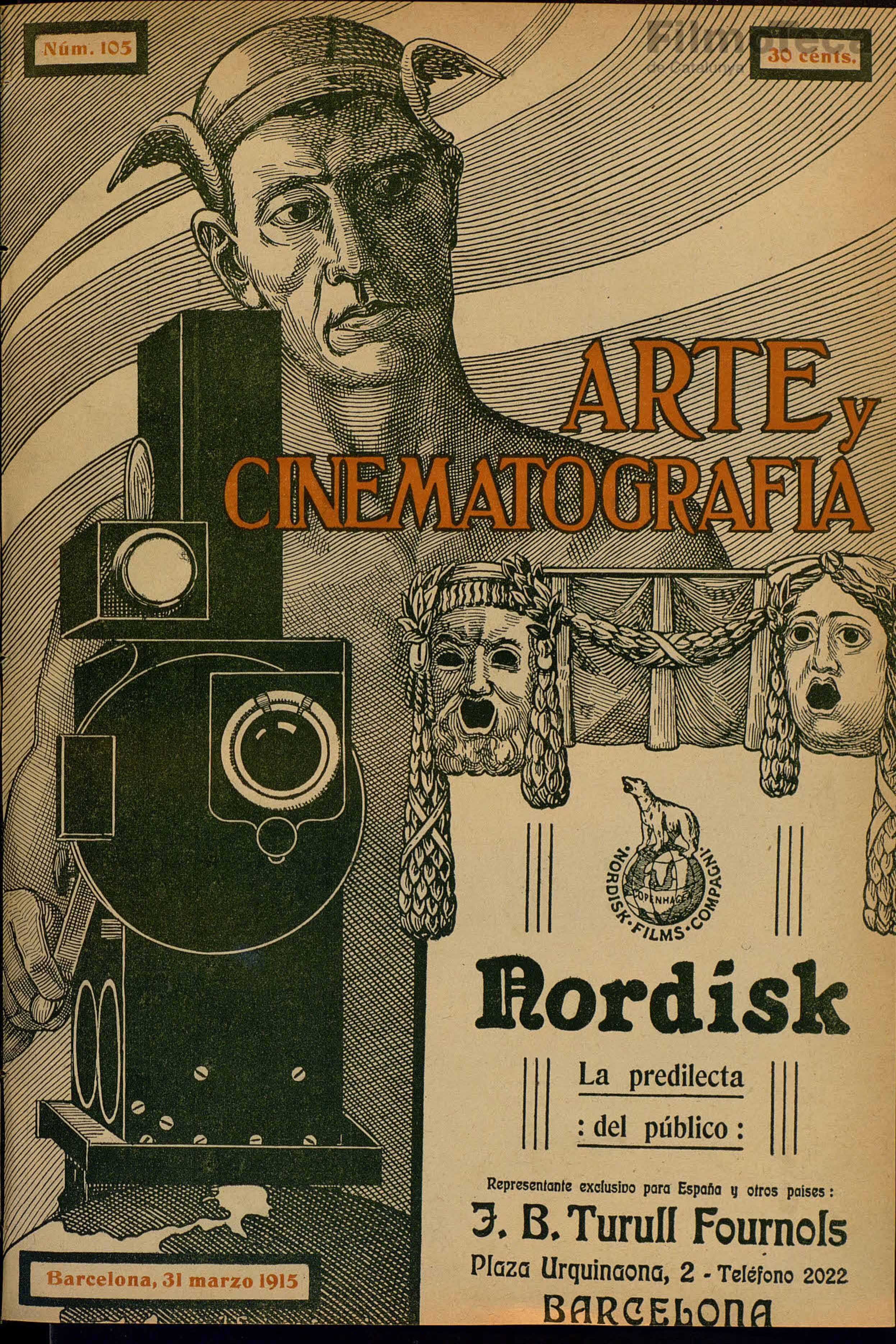 Coberta de la revista Arte y Cinematografia. Num. 105. 1915